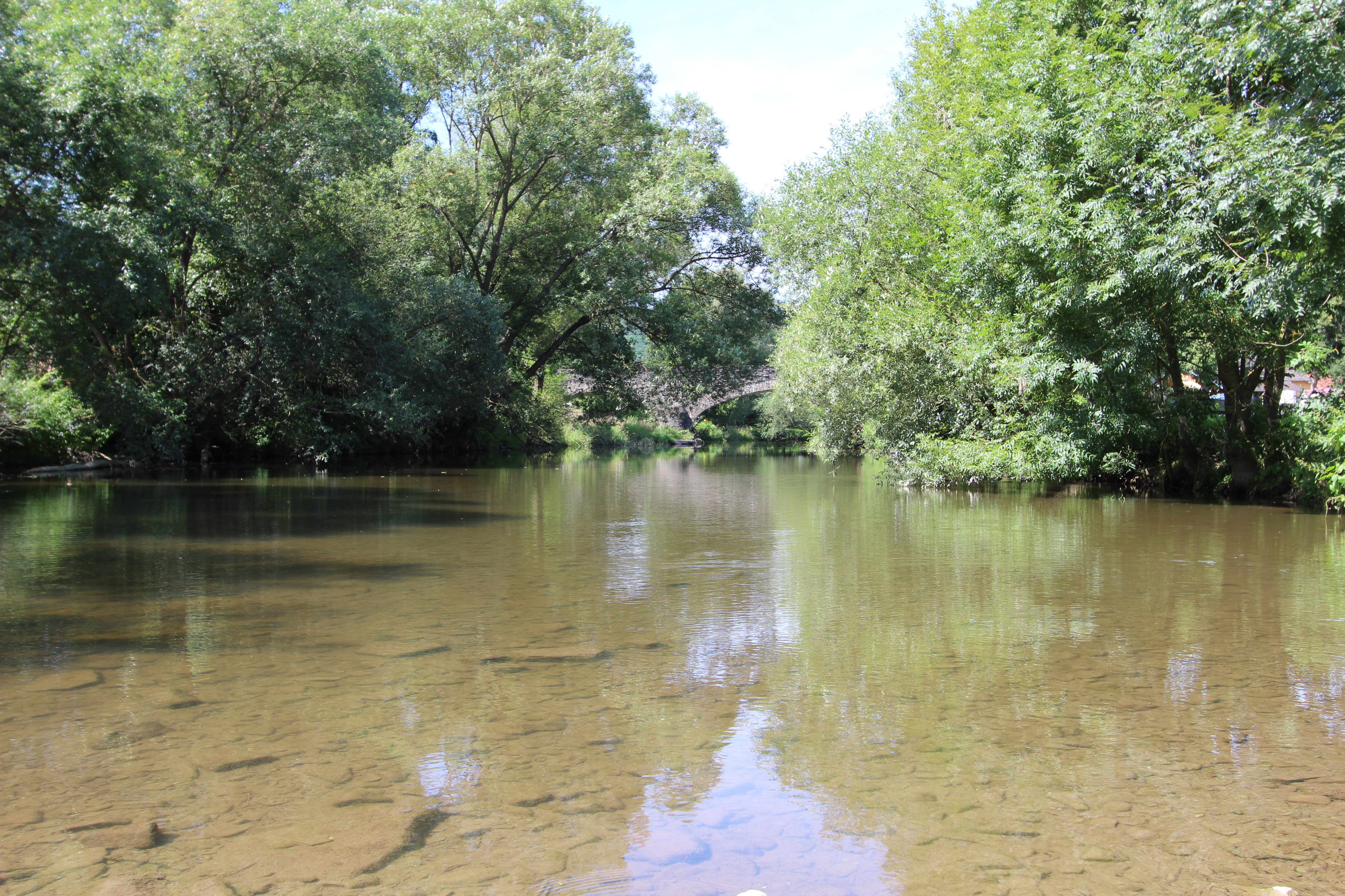 53520 Insul. Stauwehr der Ahr mitten durch den Ort. Aufnahme von 2017.